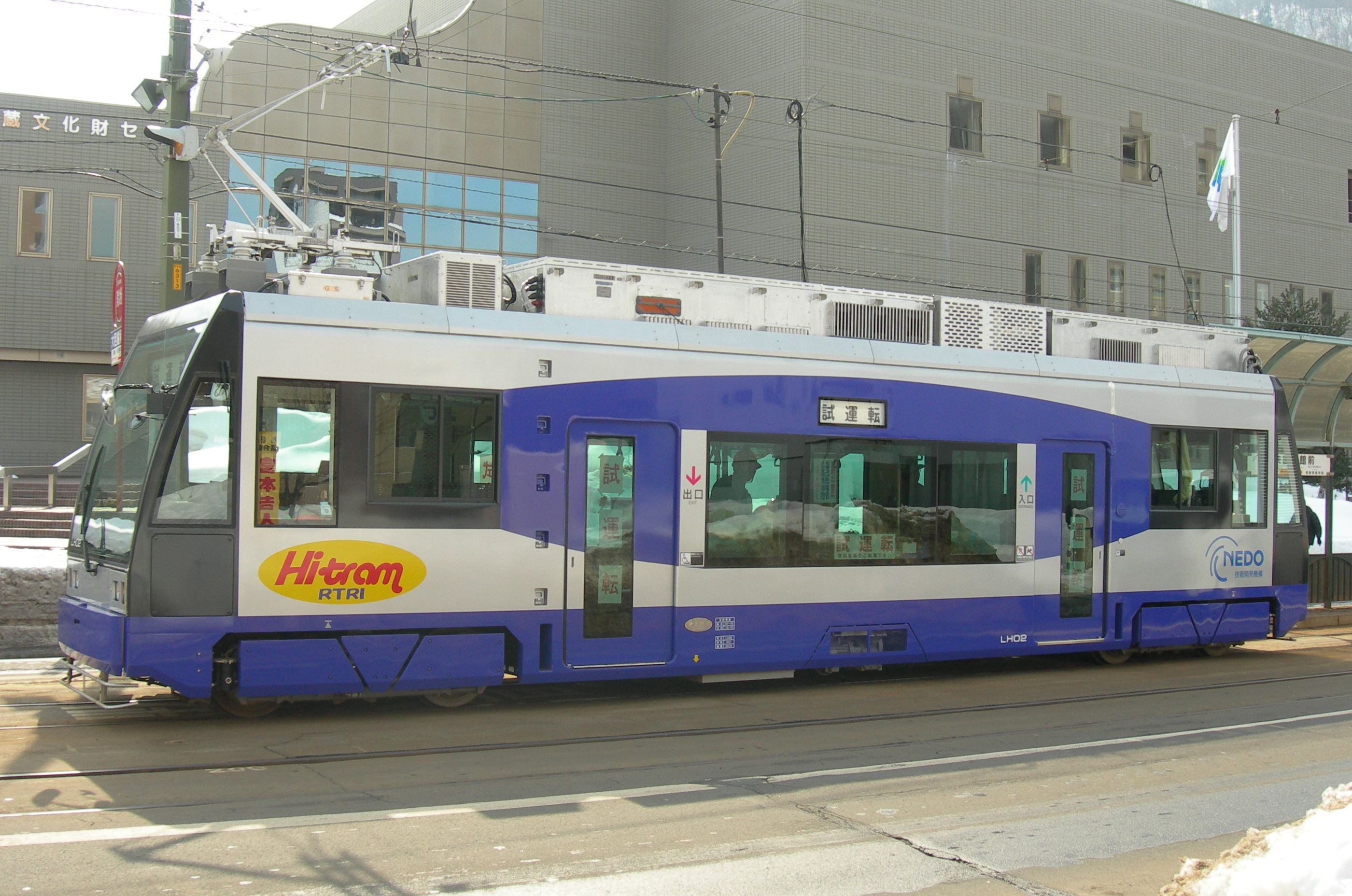 鉄道総研試験車両「Hi-tram」